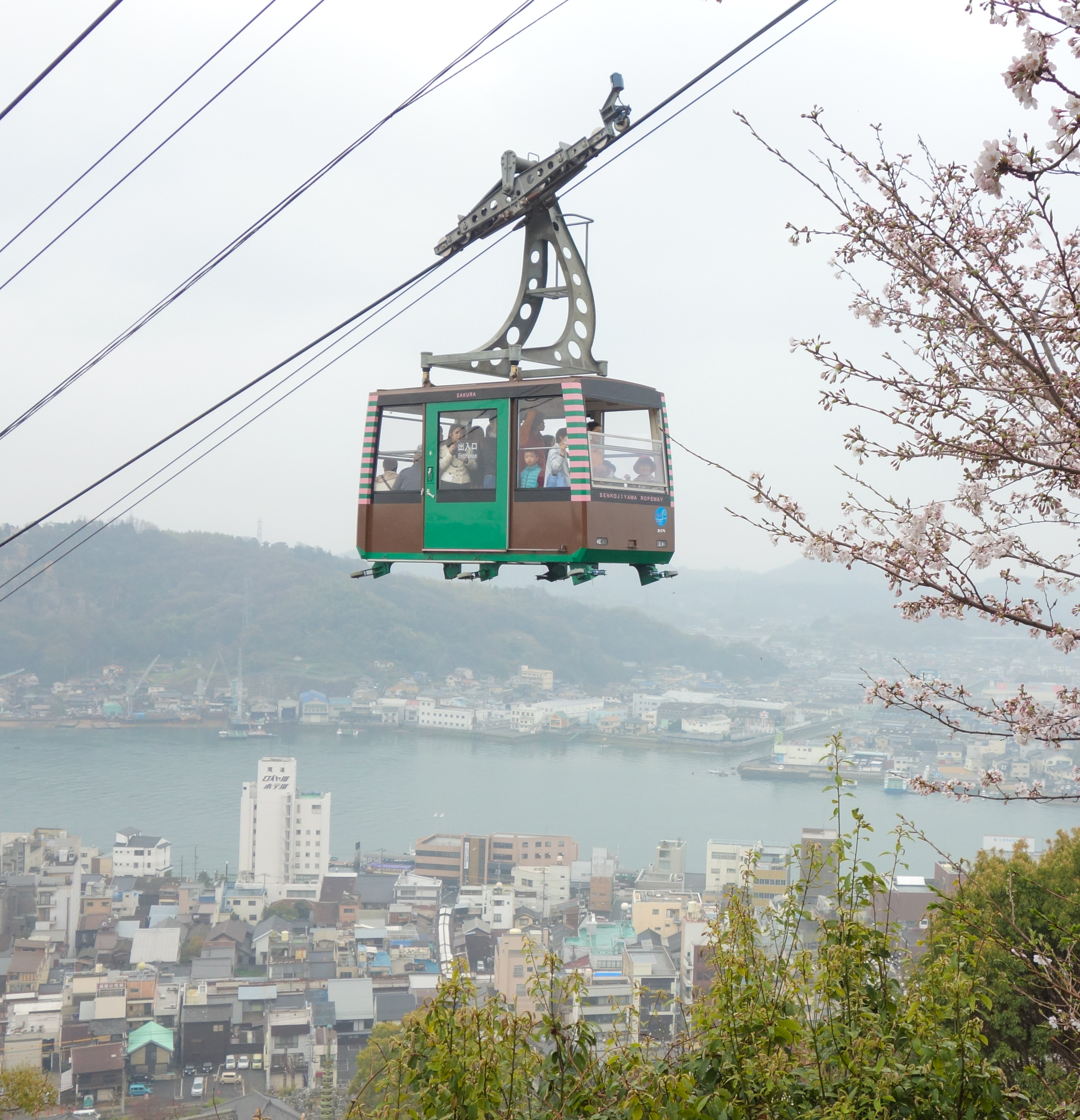 千光寺山ロープウェイ「さくら」（3代目）